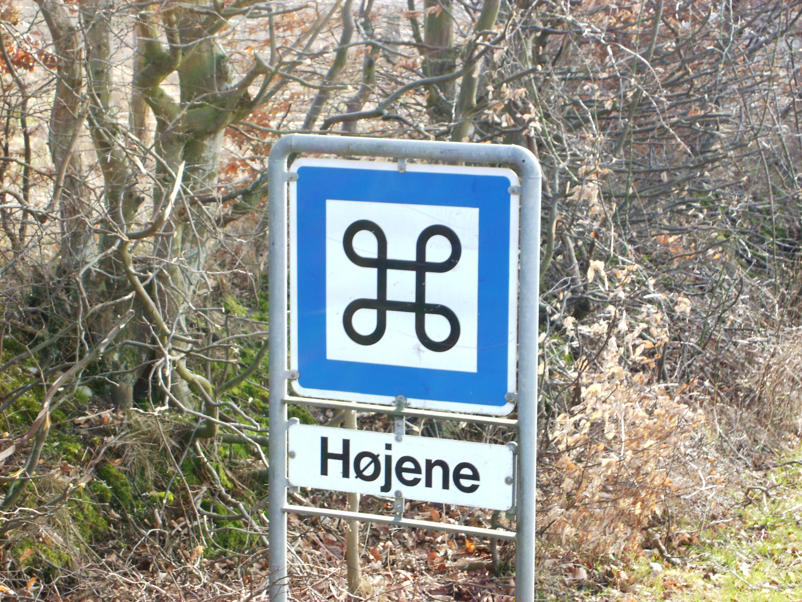 Højene (Godsted sogn) er en samling på 43 bronzealdergrave fra 1000-500 f.Kr. Som 43 graves from 1000-500 B.C (Denmark, Lolland)